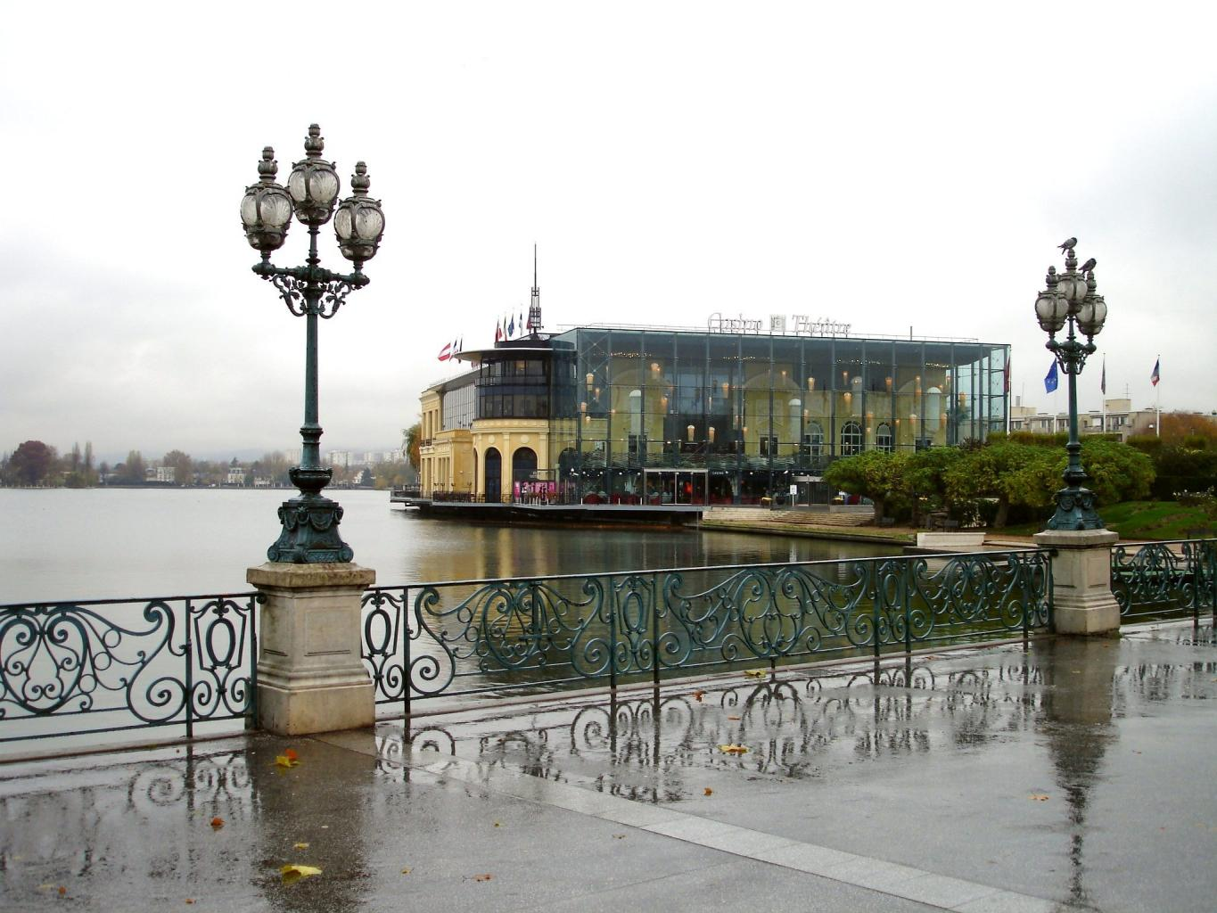 L'esplanade Patenôtre-Desnoyers et le casino - Enghien-les-Bains (France)